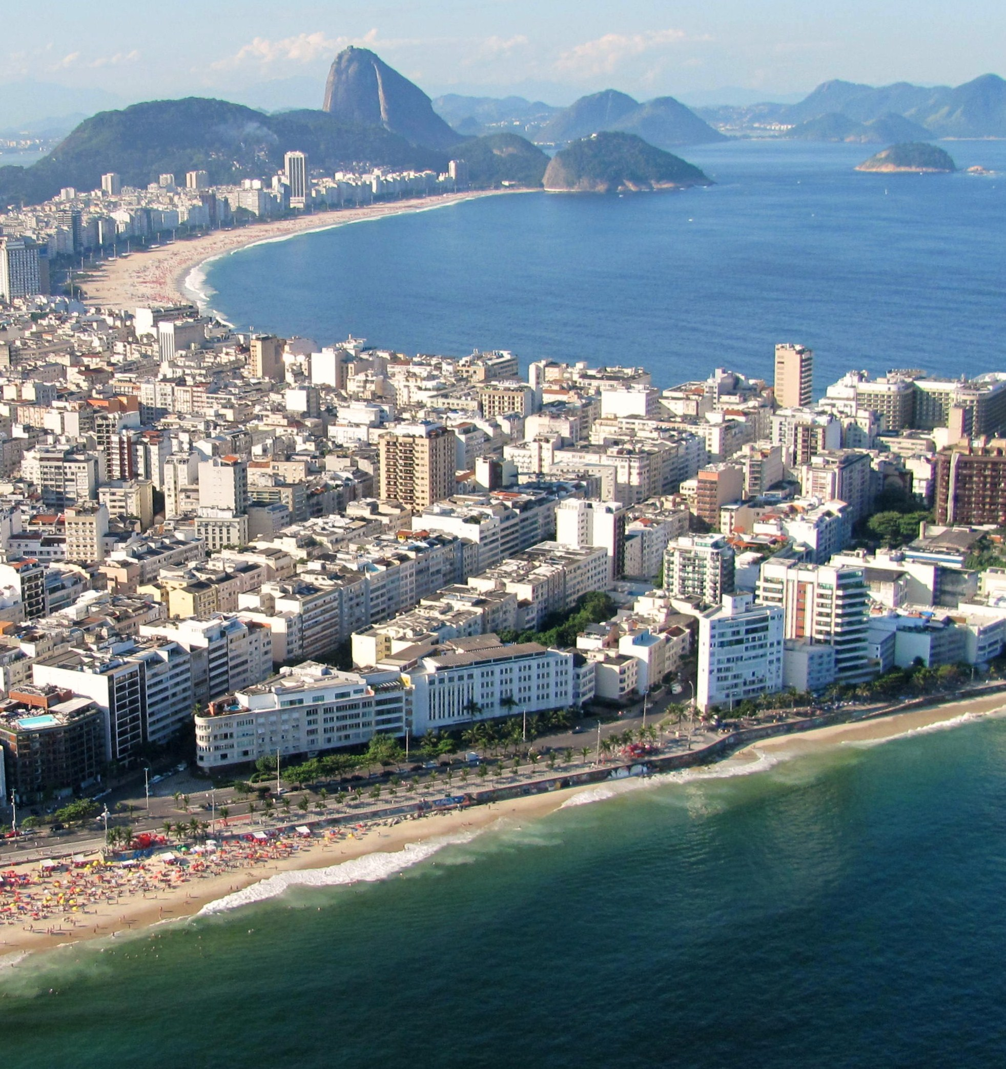 Reta e curva de Copa